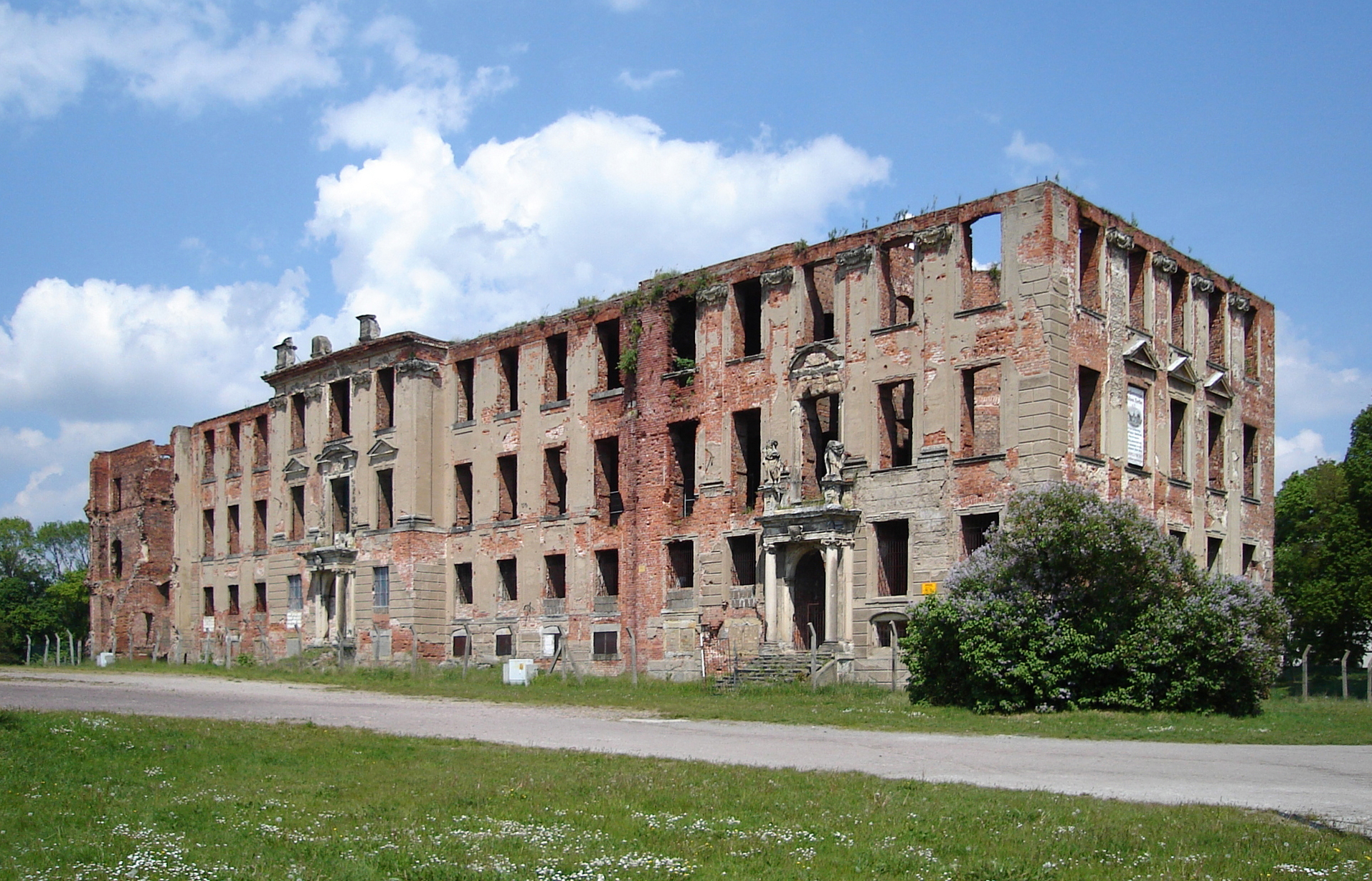 Zerbst, Schlossruine (Ostflügel)